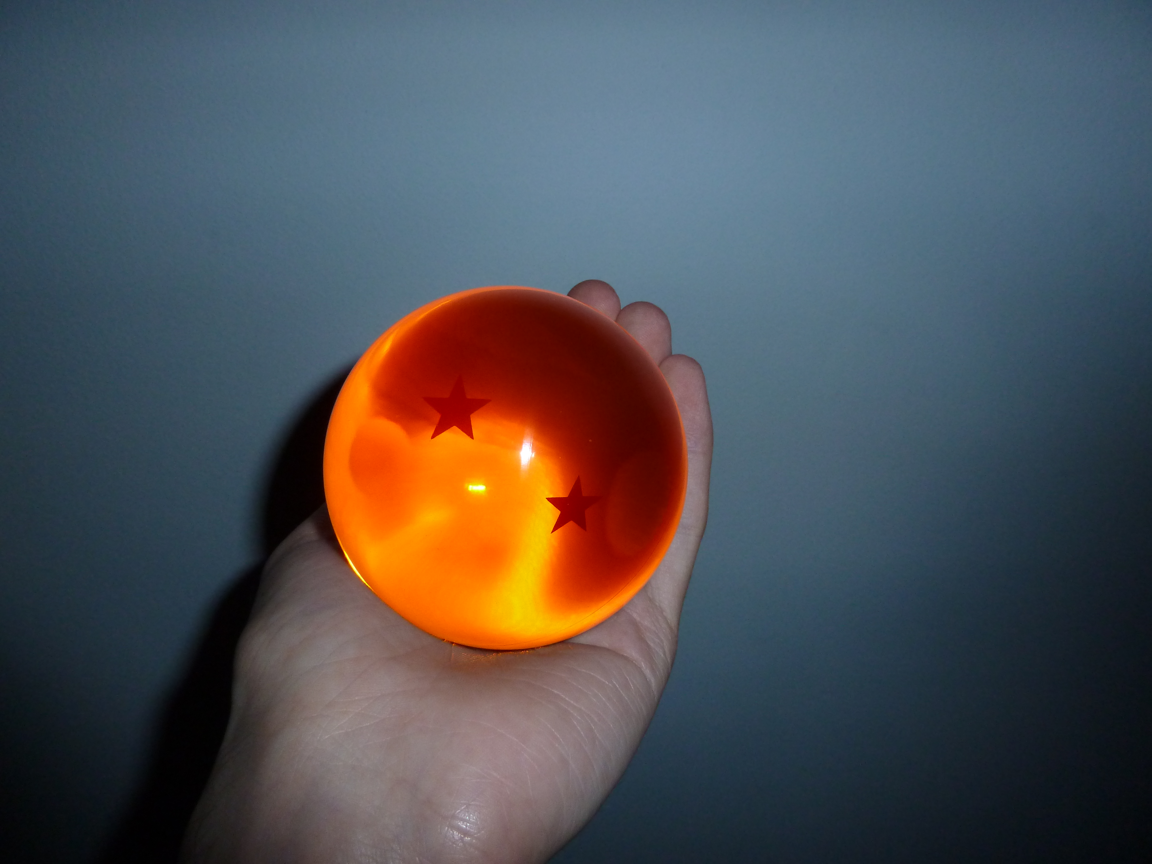 Dragon Ball en plastique